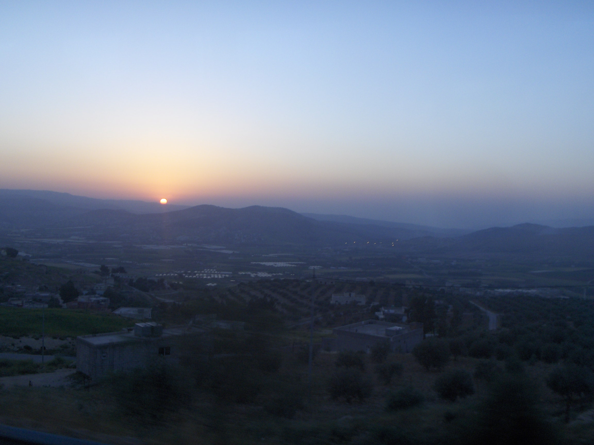 Tramonto sulla periferia della città